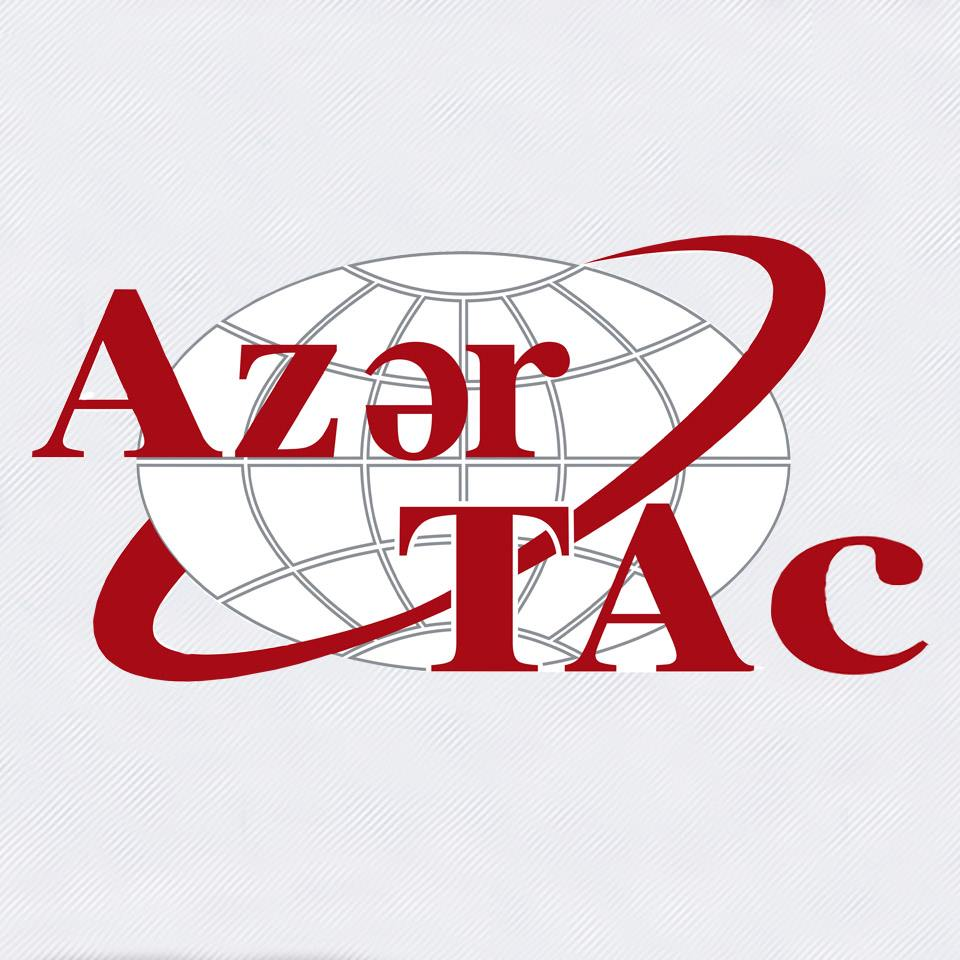 AzərTAc-yeni loqo